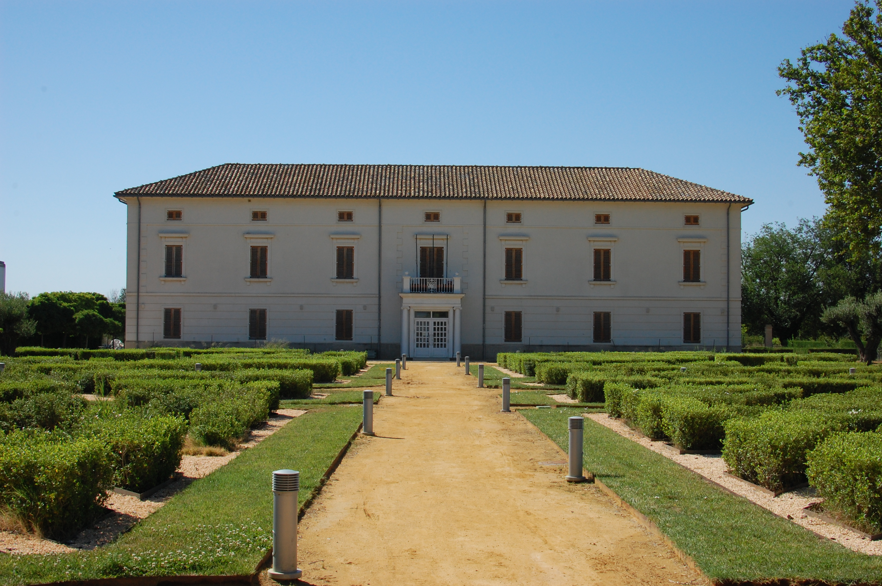 Aragonés: Palacio Alfranca